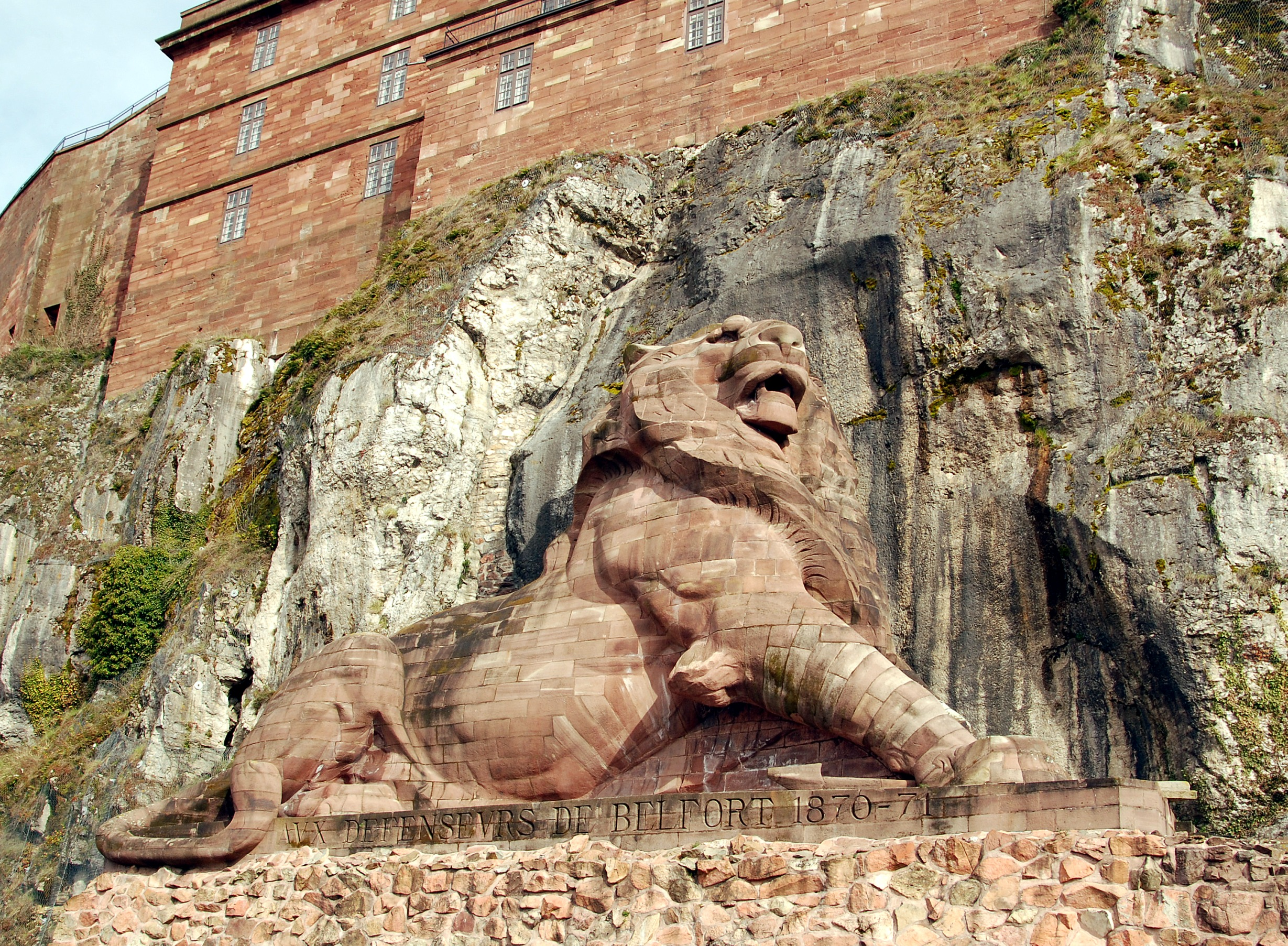 Löwe von Belfort, Frankreich